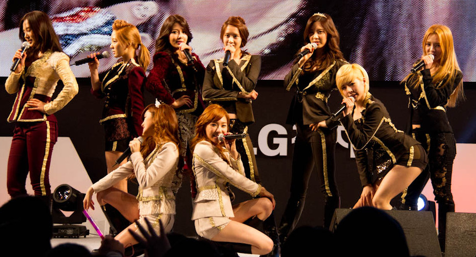 Lg전자가 3월 31일, 4월 1일 양일간 서울 잠실동 롯데월드 아이스링크에서 'lg 시네마3d 월드페스티벌'을 성황리에 개최했다. ※ LG전자 뉴스룸 에서 관련 보도자료를 확인실 수 있습니다.